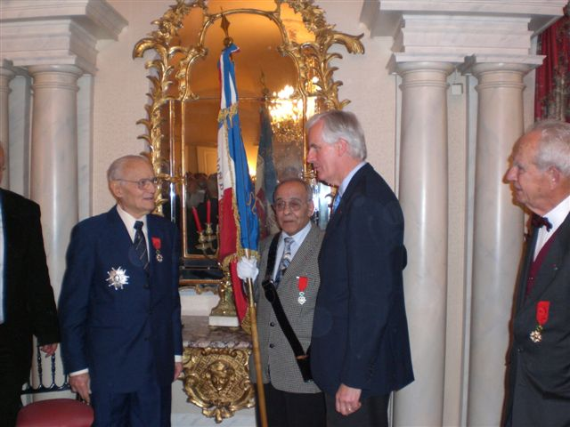 Remise des insignes de Grand Officier de la Légion d'honneur par Michel Barnier (ancien président du Conseil général de la Savoie et actuel ministre de l'Agriculture et de la Pêche) au général Pierre Vincent, Château des Ducs de Savoie, Chambéry, 26 janvier 2008.